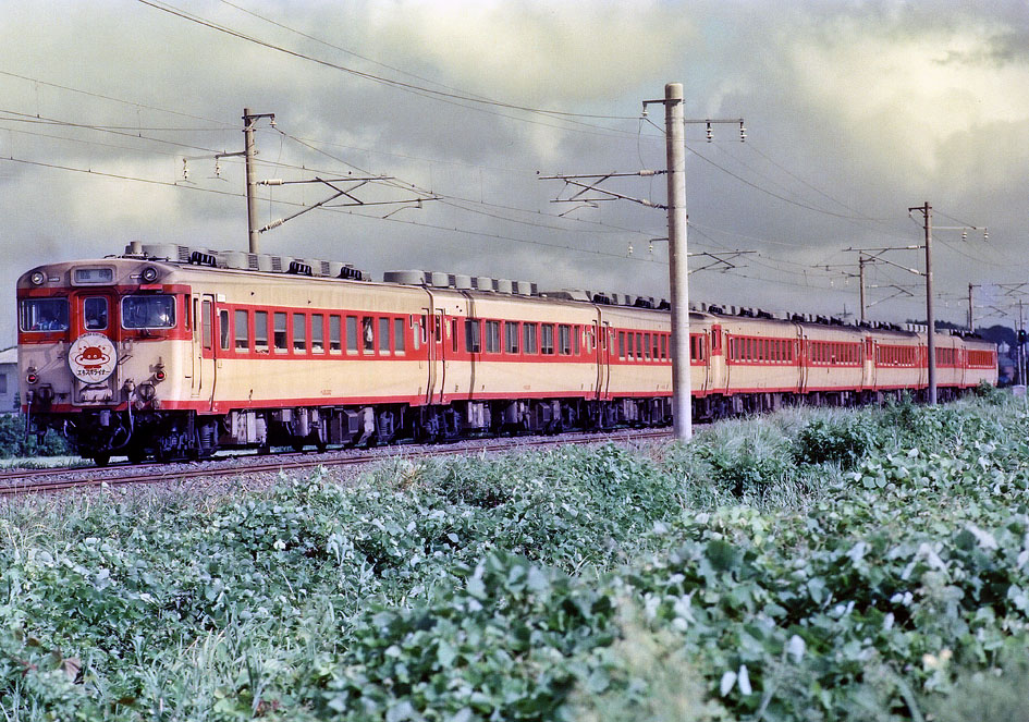 国鉄キハ58系「エキスポライナー」